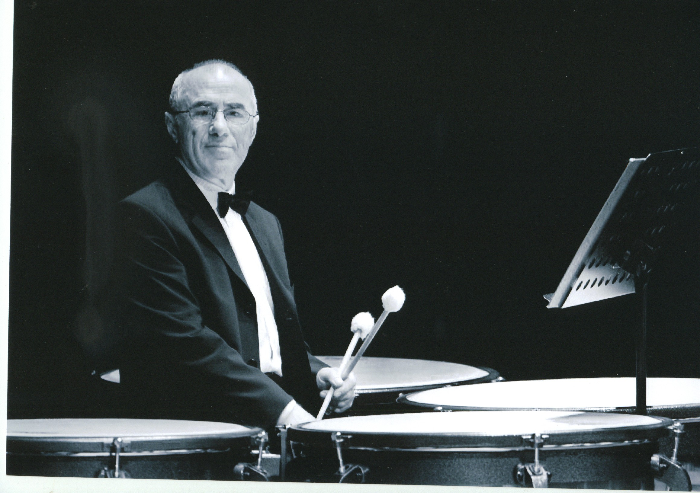 Гайков Владимир Михайлович